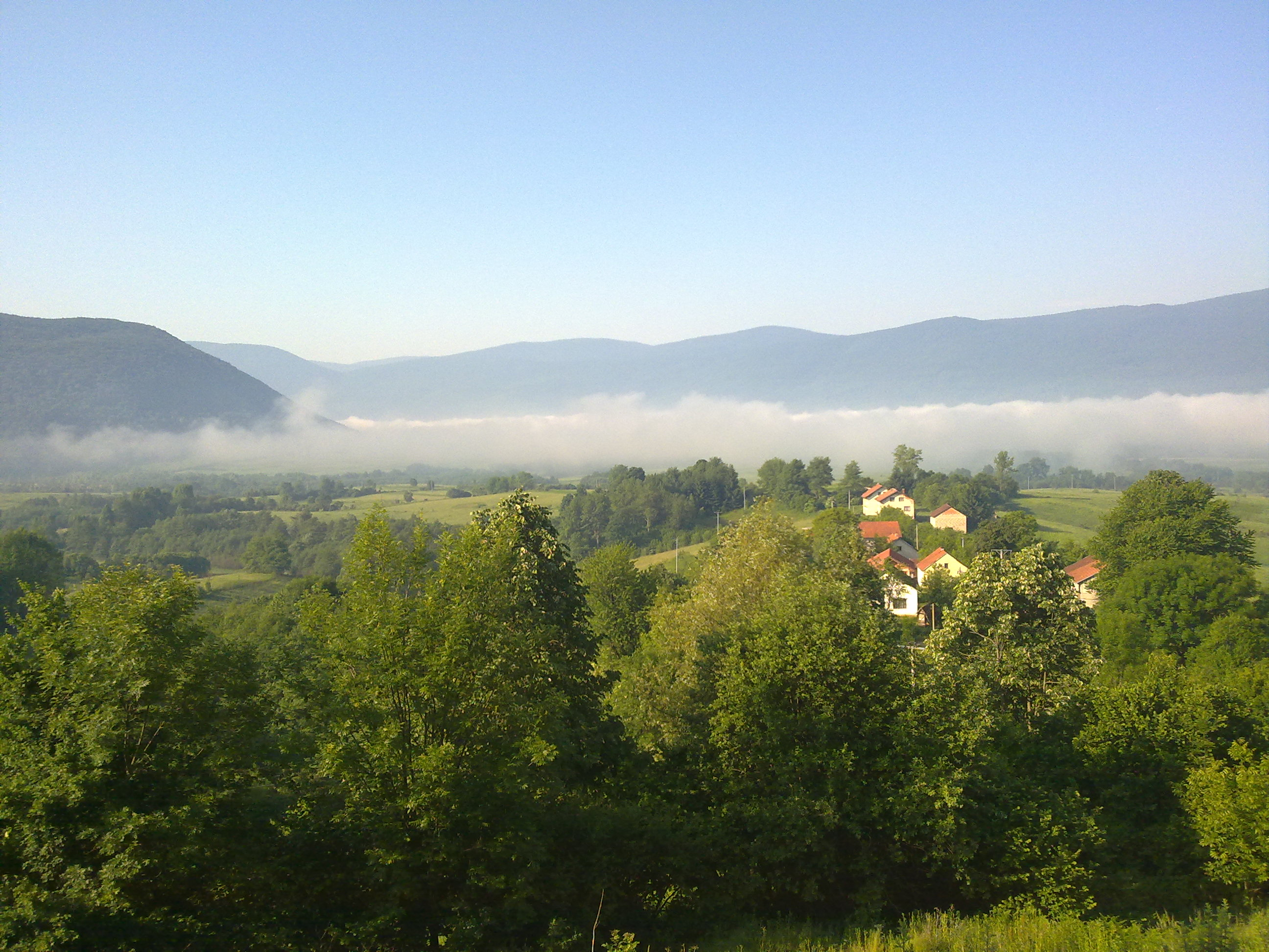 Lušci Palanka